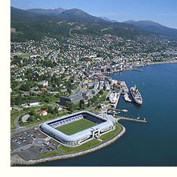 Sparviere, Molde240.jpg